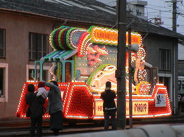 鹿児島市交通局20形電車